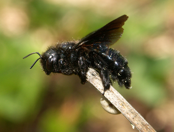 Petit xylocope bleu (Xylocopa iris) au repos, un matin, prêt à décoller.